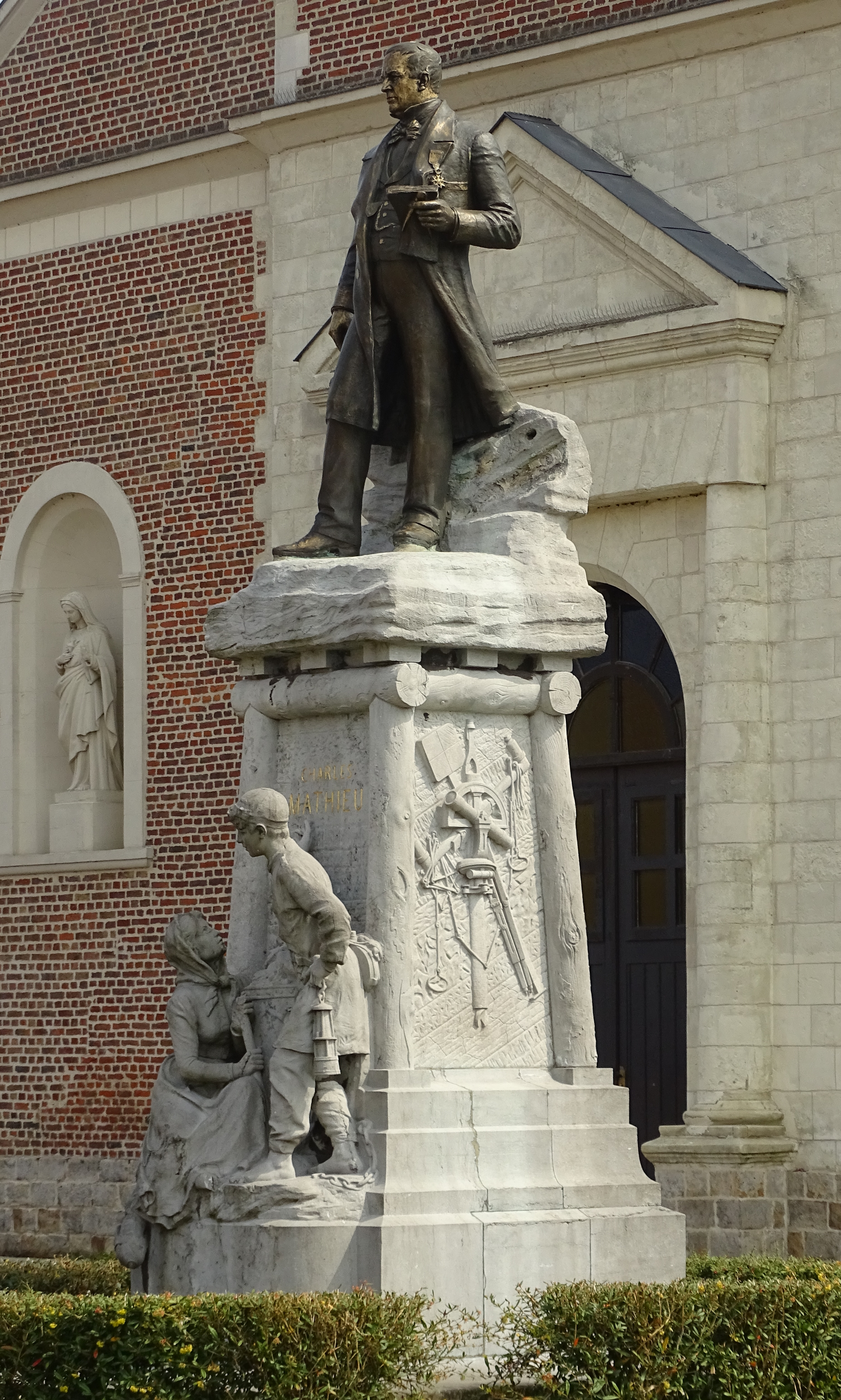 Monument à Charles Mathieu, Compagnie des mines de Douchy, Lourches, Nord, Nord-Pas-de-Calais, France.